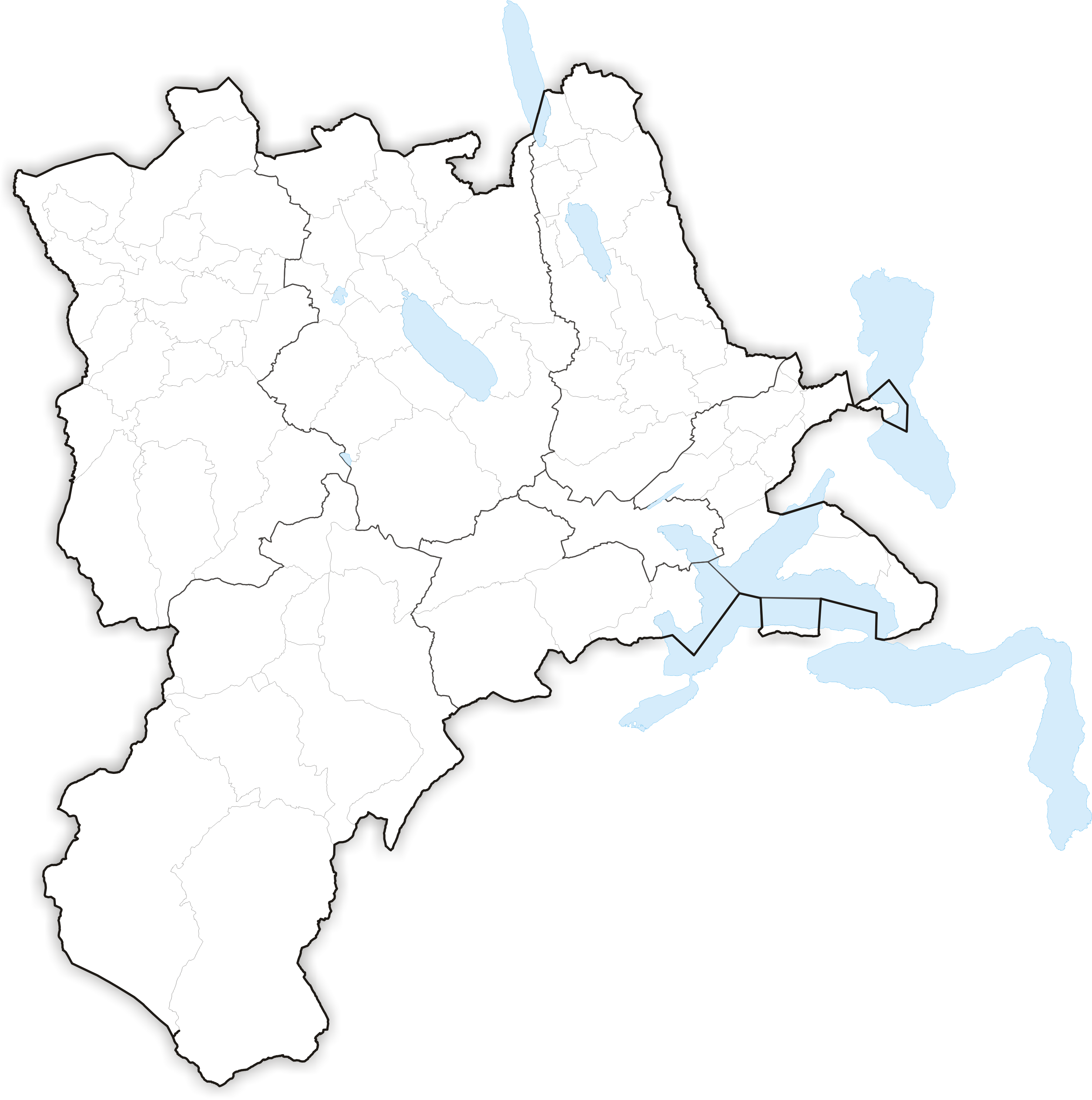 Municipalities in Canton Luzern